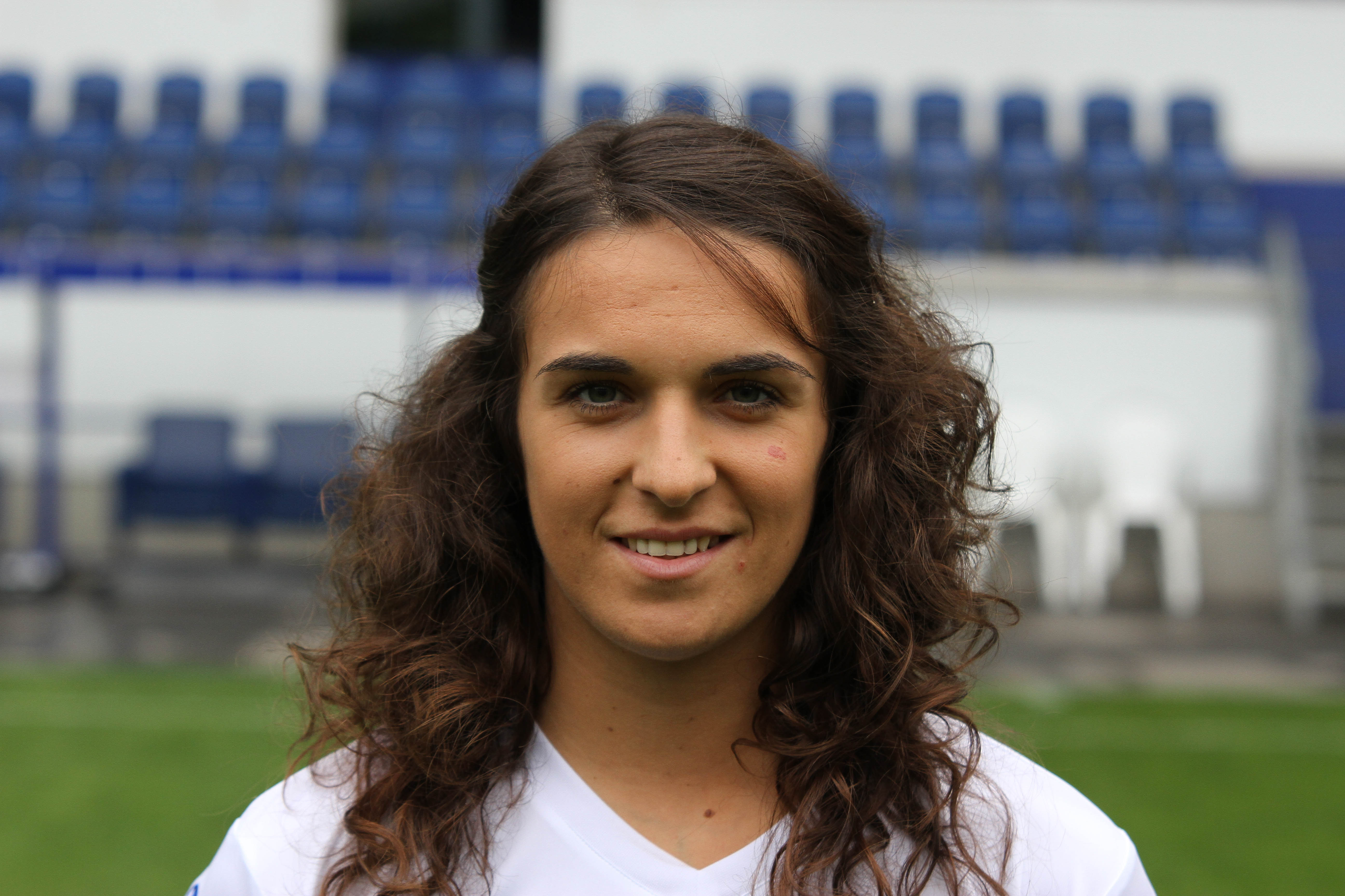 Laura Luis (2014)